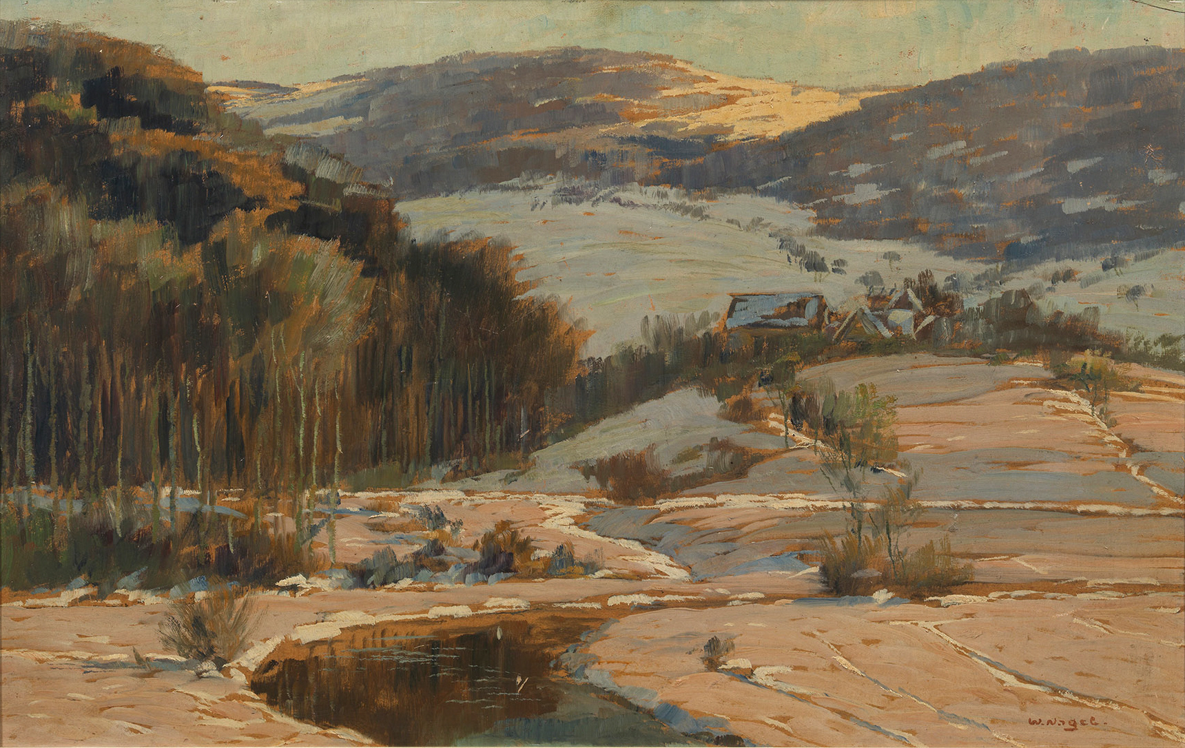 Winter auf der Schwäbischen Alb. Öl auf Malkarton. Rechts unten signiert; 50 cm x 78 cm